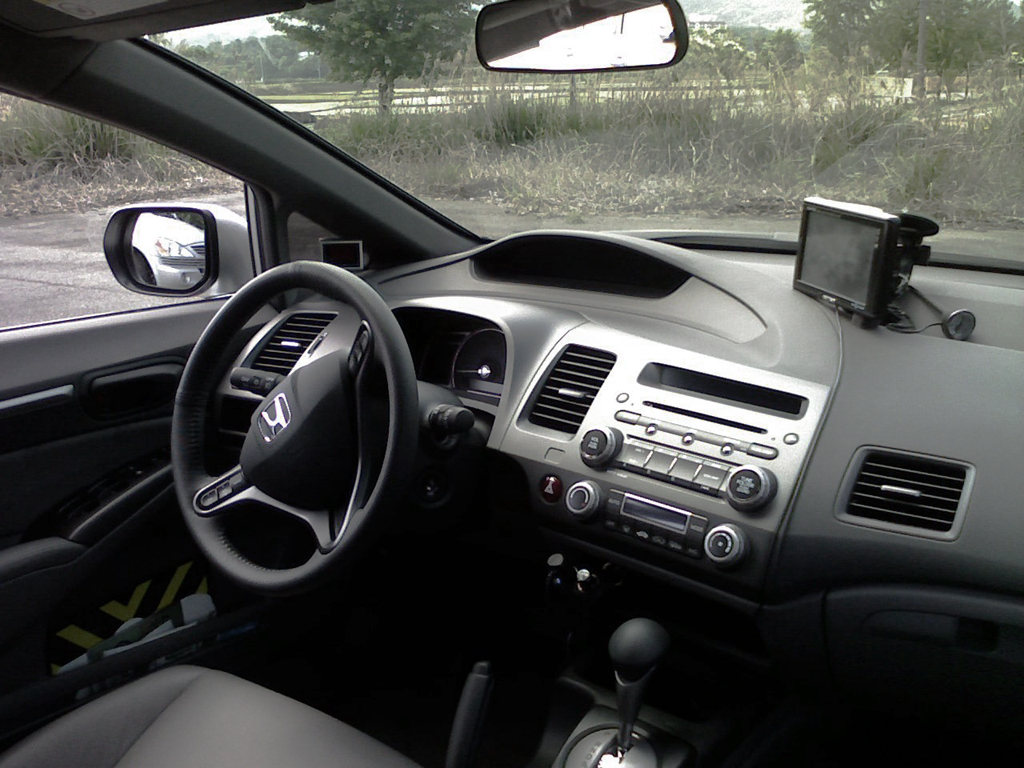 혼다 시빅(8세대, 2007년 4월식) 인테리어, 우측에서 촬영